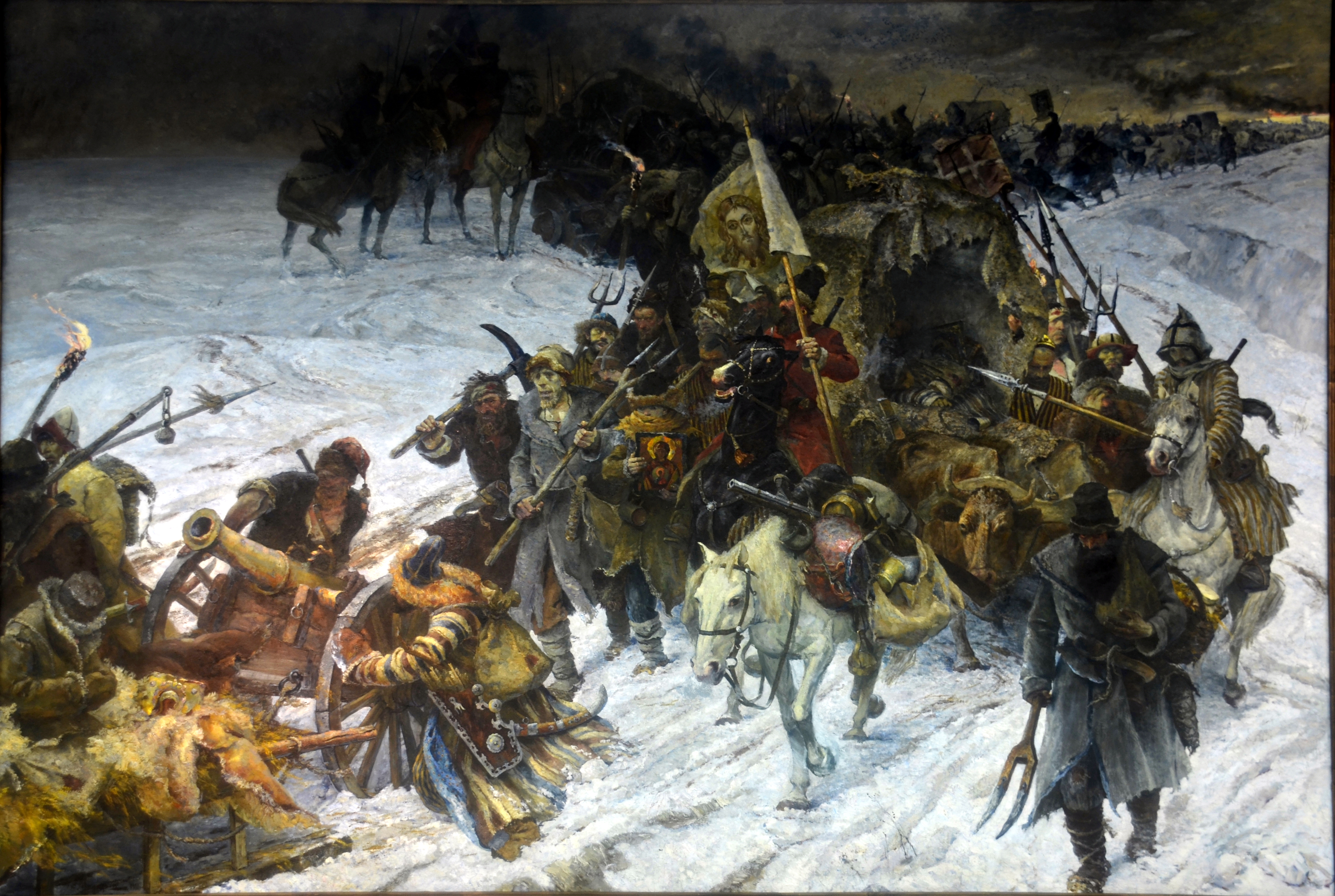 Огромная многофигурная историческая картина была создана по произведениям А.С. Пушкина и другим историческим источникам и посвящена крестьянскому восстанию 1773-75 гг. под предводительством Е.И. Пугачева.